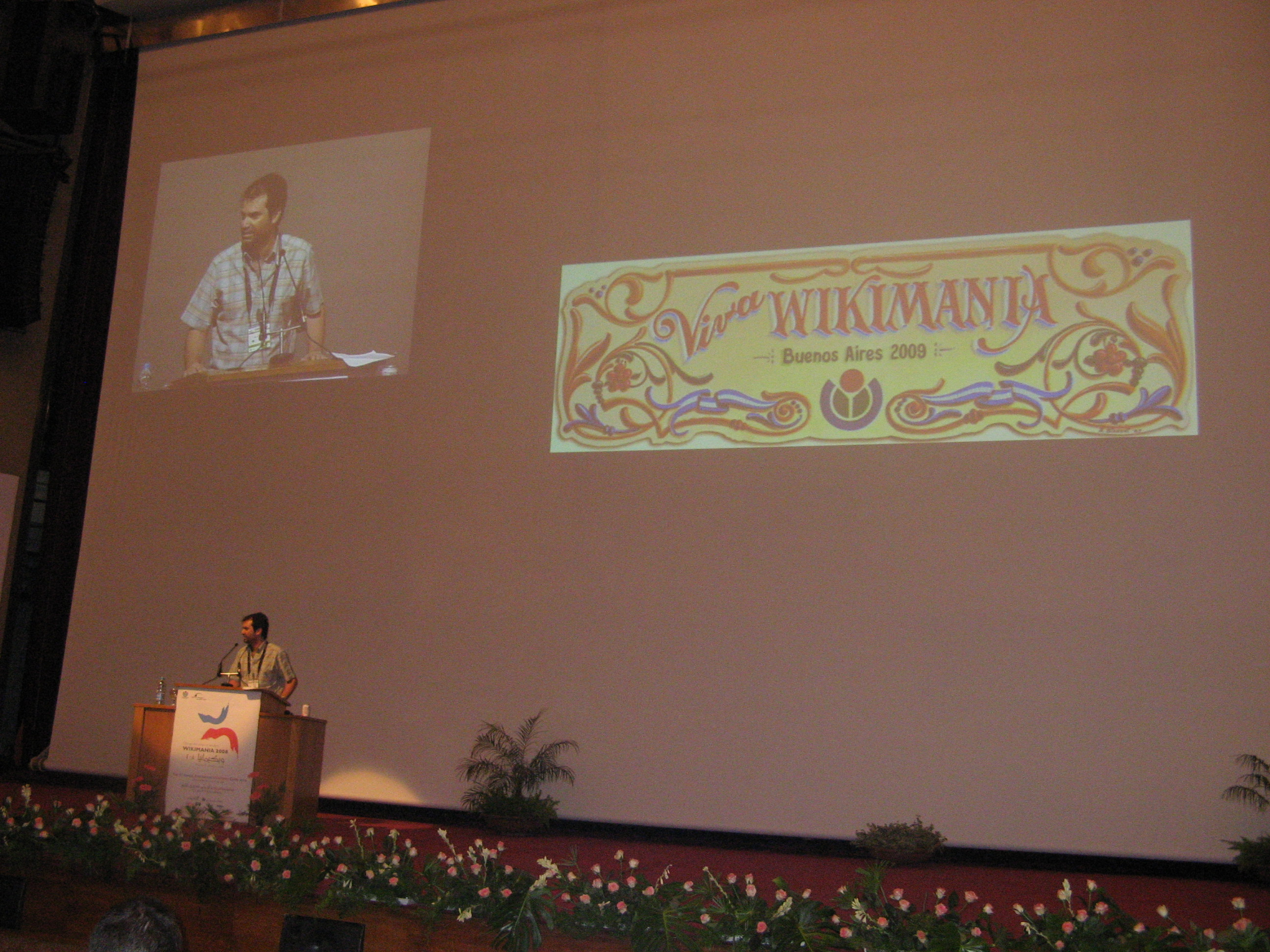 Patricio Lorente